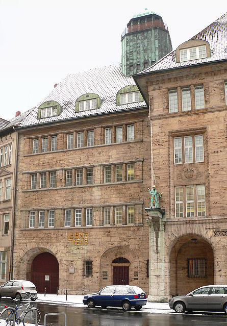 Bahlsen Keksfabrik Hannover, Jugendstilfassade